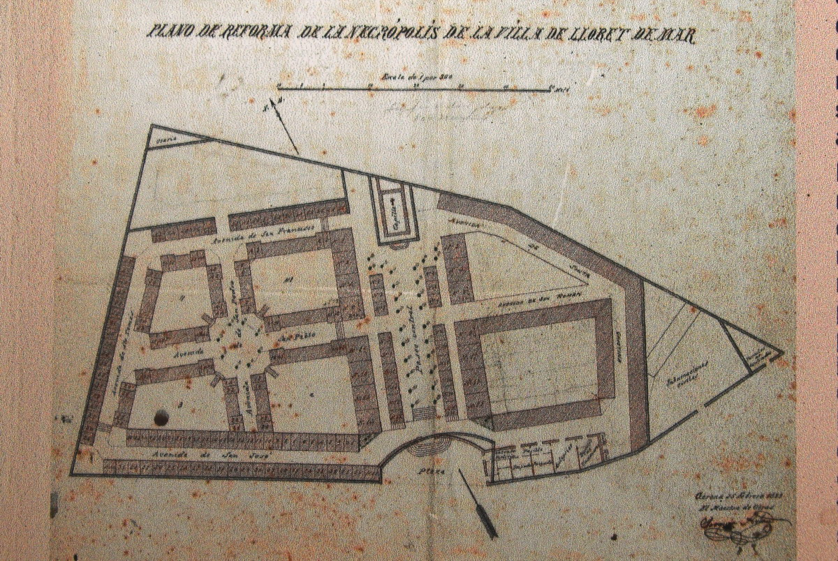 Plànol del cementiri modernista de Lloret de Mar (La Selva-Catalunya)(1901).